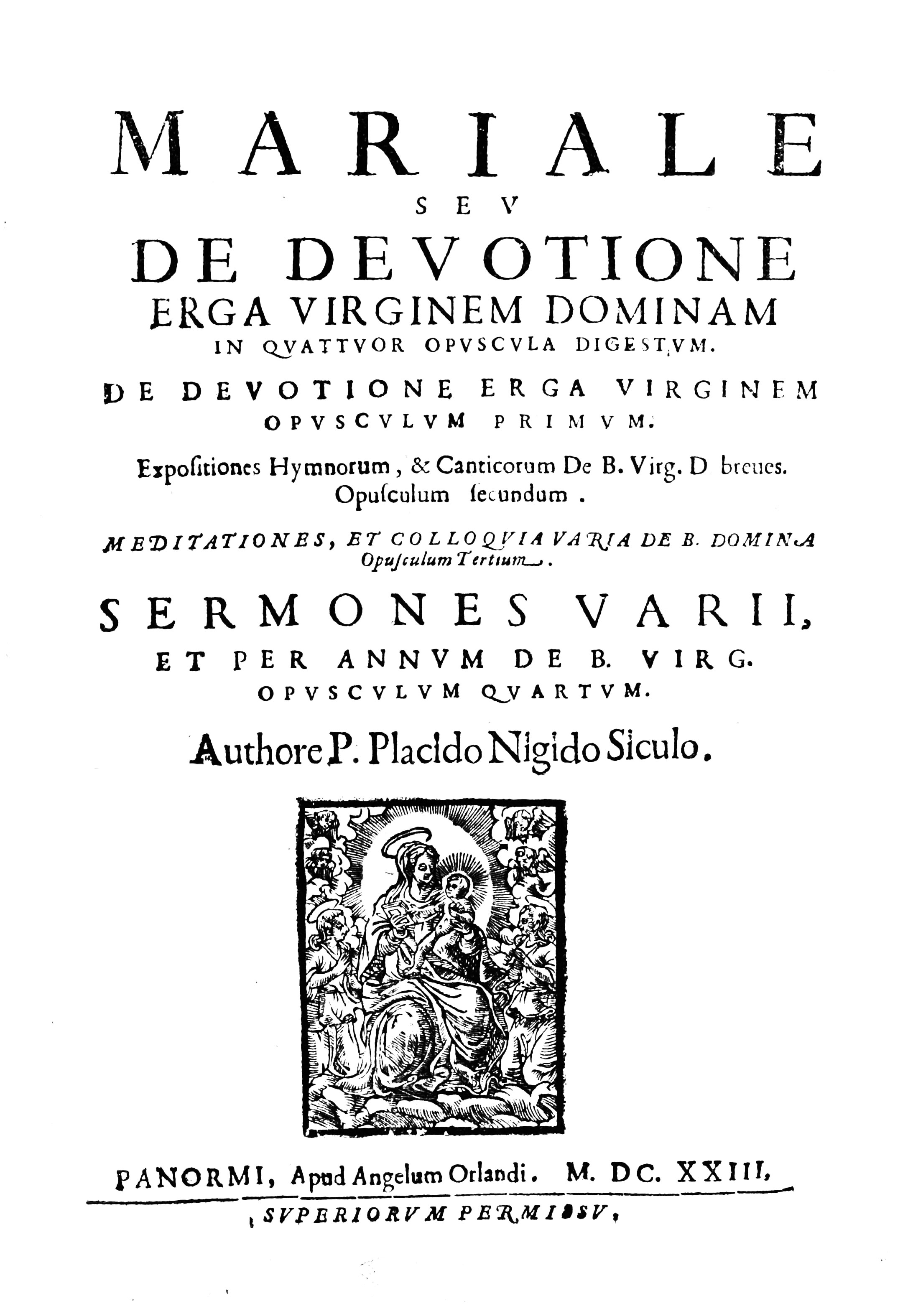 Frontespizio dei sermoni vari di Placido Nigido